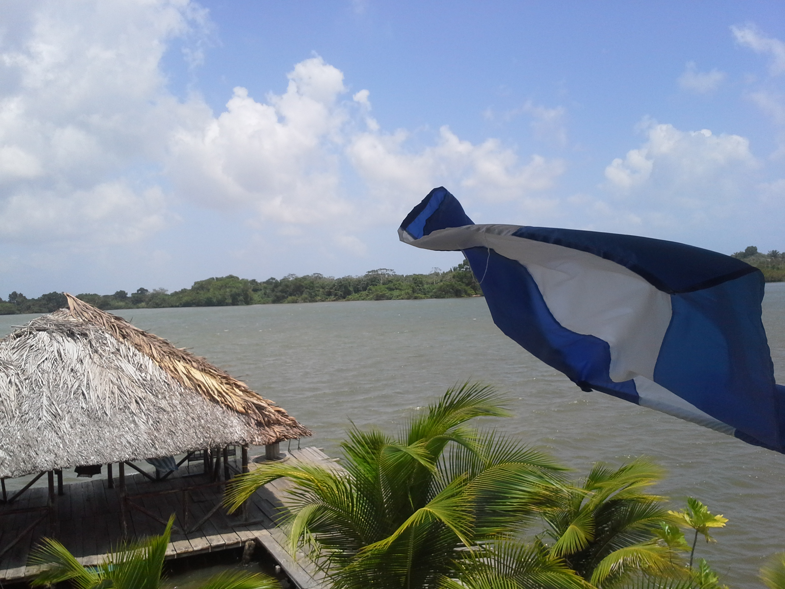 Laguna de Perlas desde restaurante Casa Ulrich